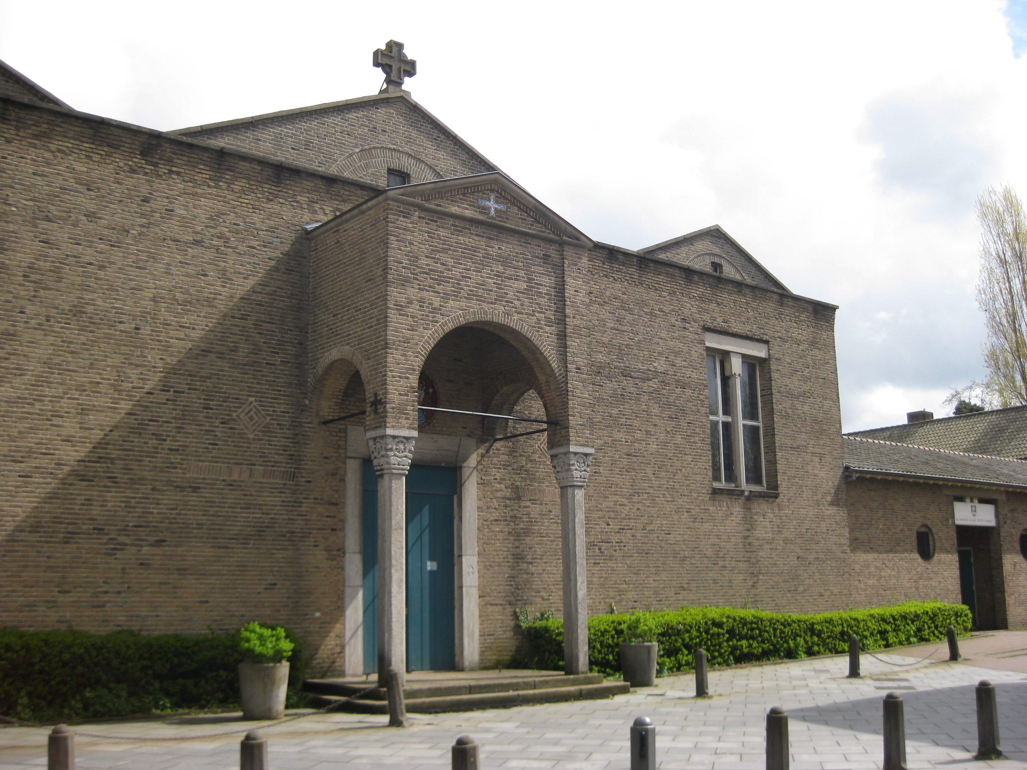 Onze Lieve Vrouwe van Lourdeskerk, M.J.Granpré Molièreplein 2, Amsterdam-West (Geuzenveld); Rooms-katholieke kerk. Architect M.J.Granpré Molière